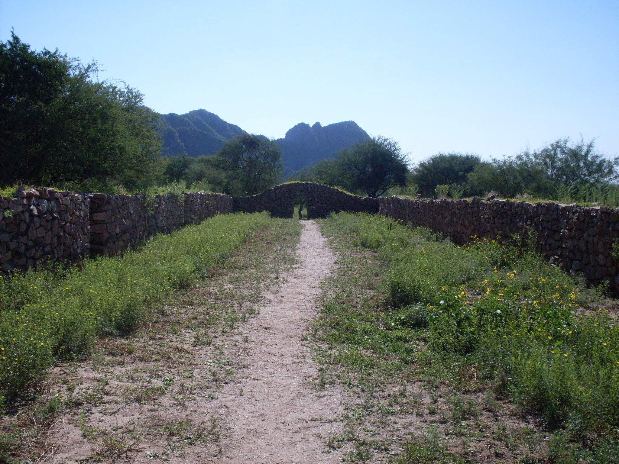 Ruinas del Shincal, Londres, Catamarca, Argentina.